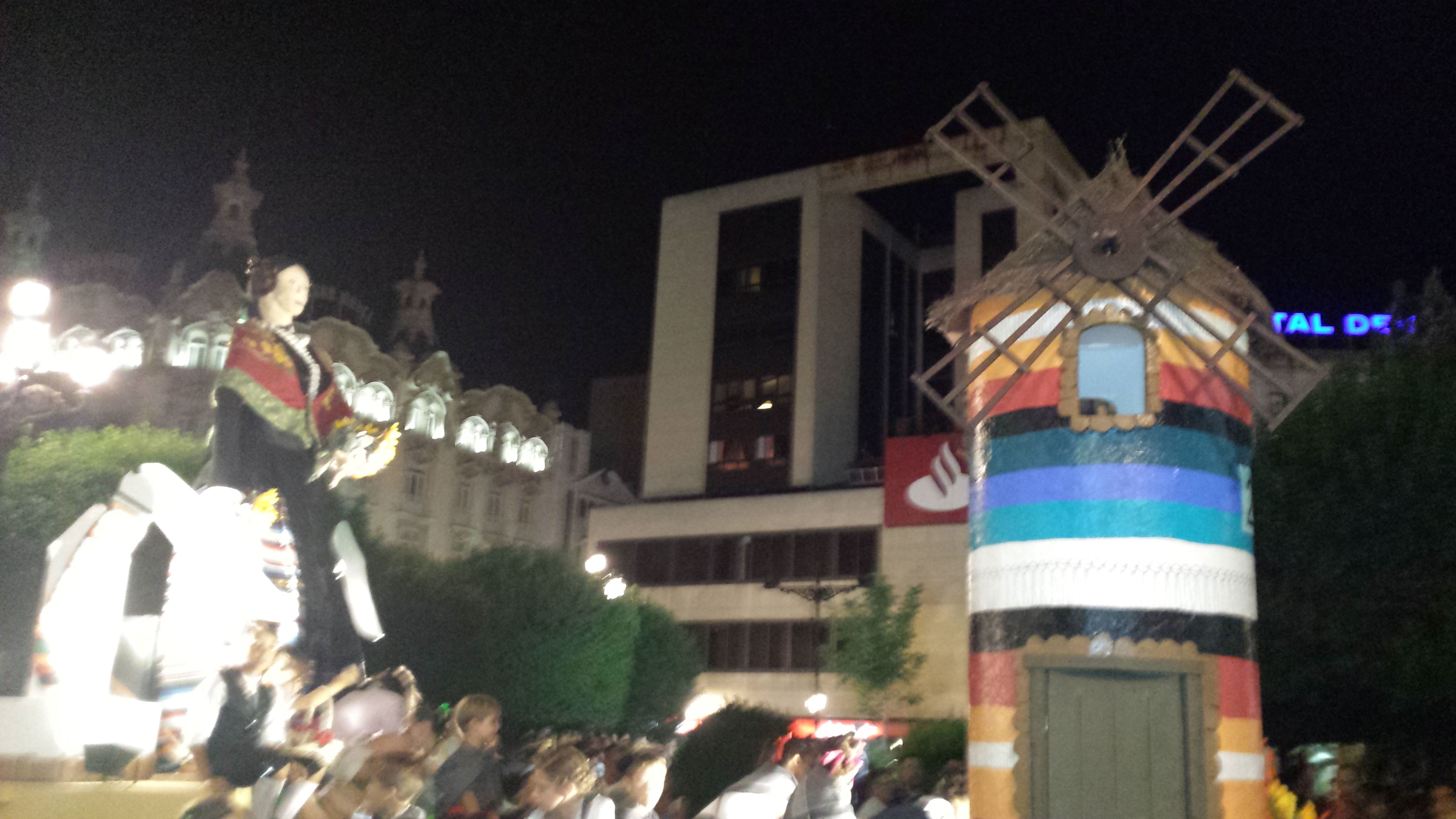 Cabalgata de la Feria de Albacete 2014. Manchega. Molino de viento. Plaza del Altozano. Albacete.